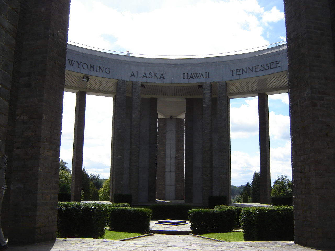 Mémorial du Mardasson op de Mardassonheuvel BASTOGNE